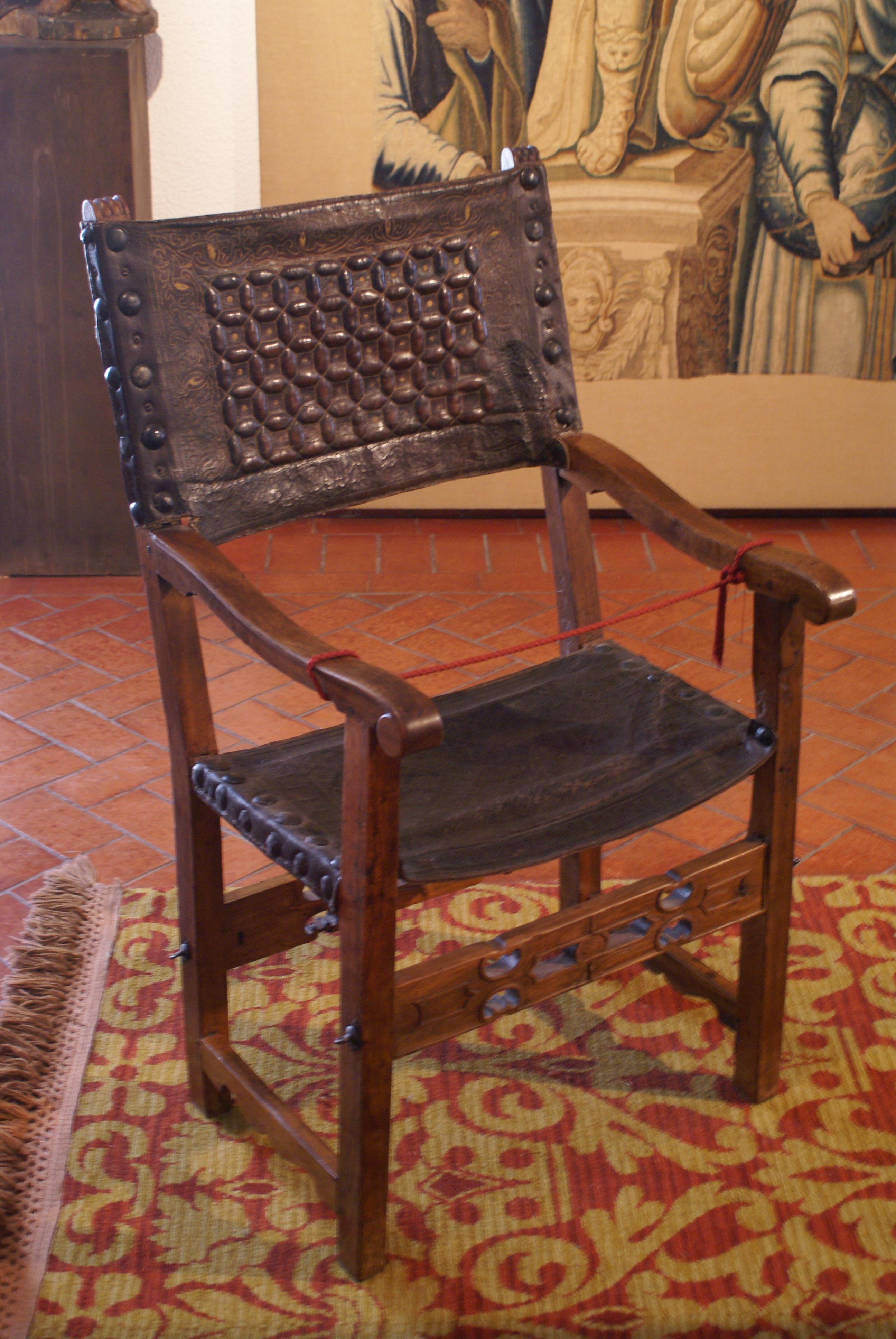 El sillón del Diablo, en el Palacio de Fabio Nelli, Valladolid. Dicho Sillón, es protagonista de una leyenda que lleva su nombre.